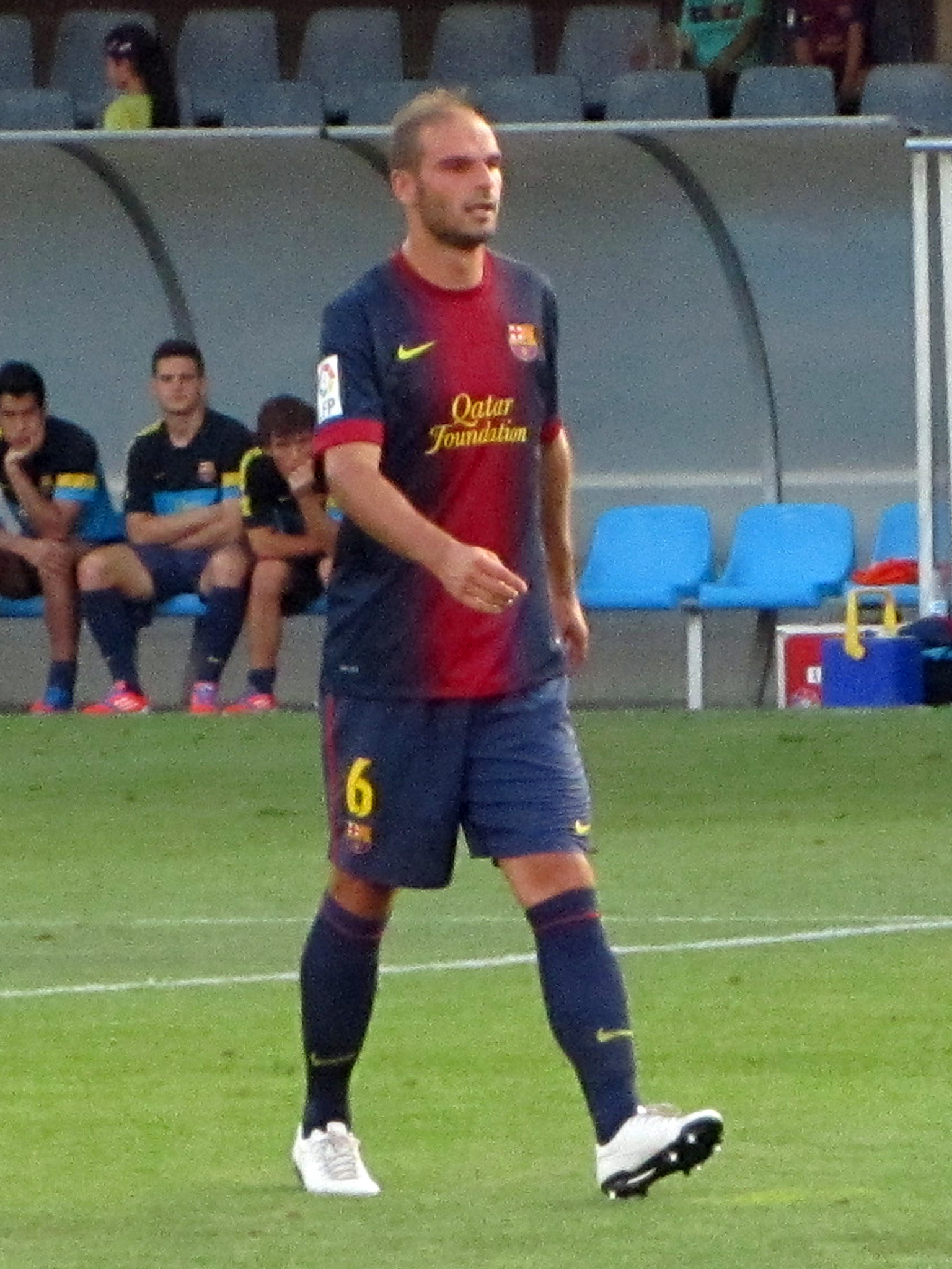 Foto realizada por Javier Segura (@castroquini)